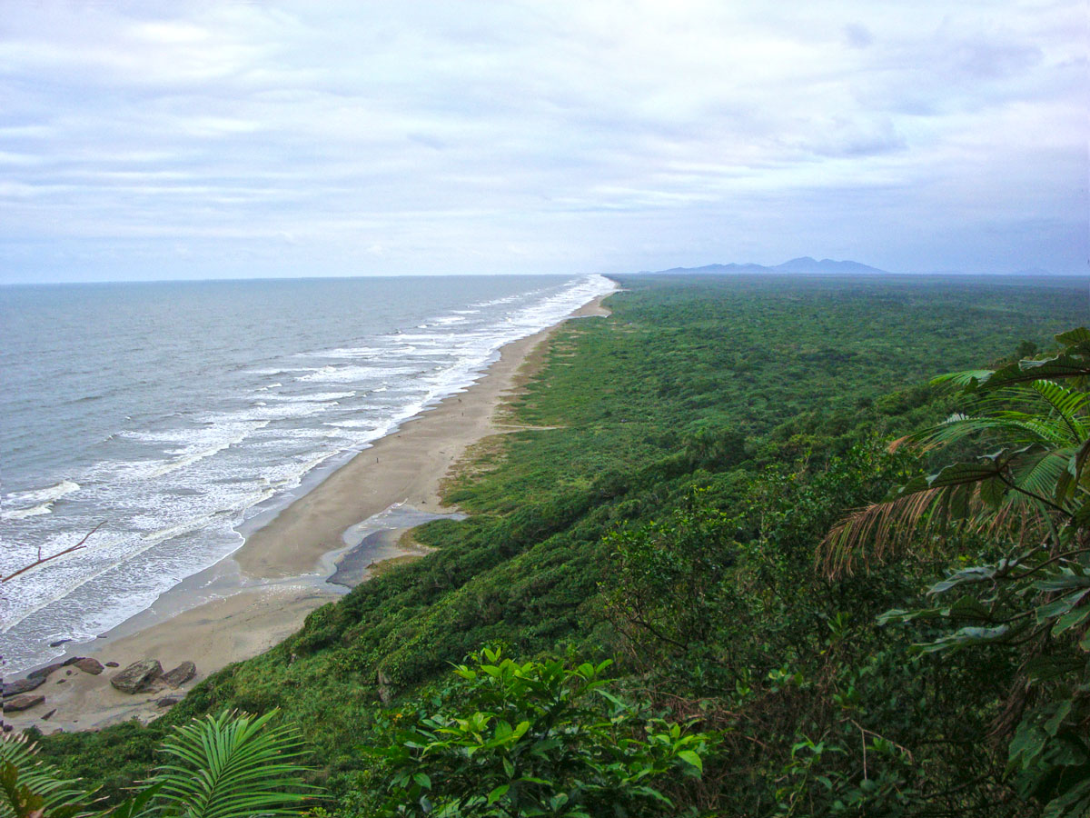 A Barra do Ribeira era uma pequena vila de pescadores localizada em Barra do Ribeira, no município de Iguape. O povo da Barra do Ribeira pode ser definido como povo caiçara, habitando em casas feitas de madeiras que se encontravam na praia, que encostavam no barranco quando havia maré cheia. Com o desenvolvimento da Barra do Ribeira, a praia da Barra com seus 19 Km e a Estação Ecológica da Jureia-Itatins, juntamente com o Senhor Bom Jesus de Iguape, passaram a ser as atrações turísticas. Aos pouco a pequena vila de pescadores, que a cada ano recebia pessoas de todos os lugares, foi crescendo e se desenvolvendo, tornando-se num bairro, da cidade de Iguape (SP).